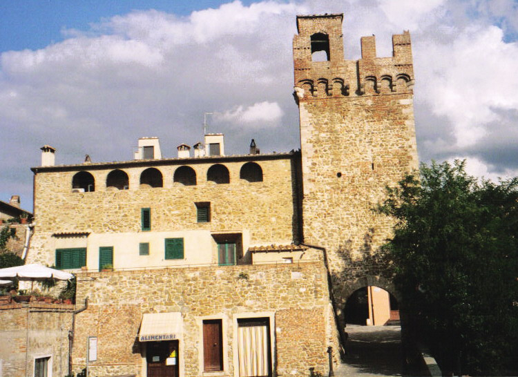 Porta Grossetana (Istia d'Ombrone), Grosseto, Tuscany (Italy)